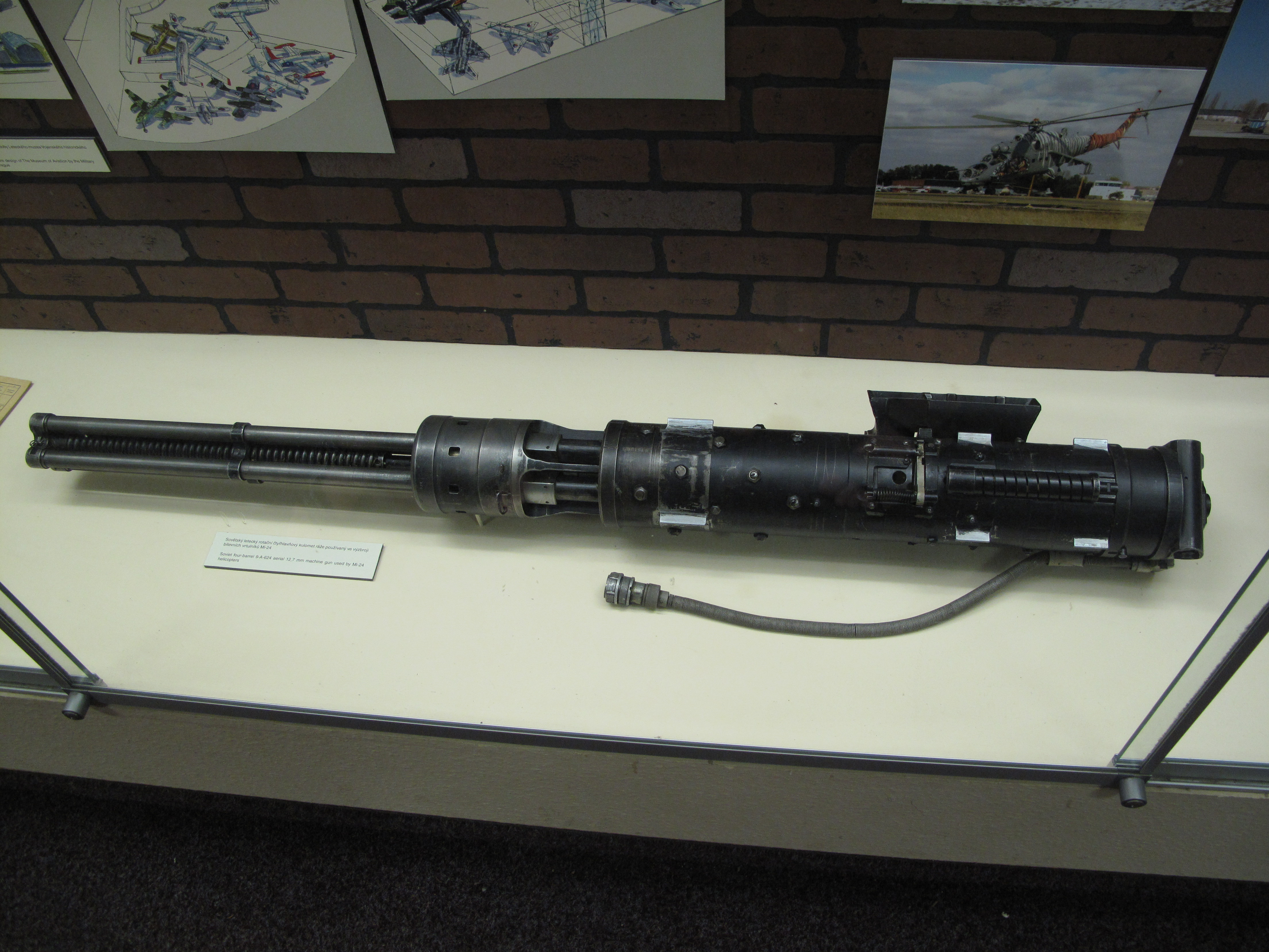 Česky: Letecké muzeum Kbely